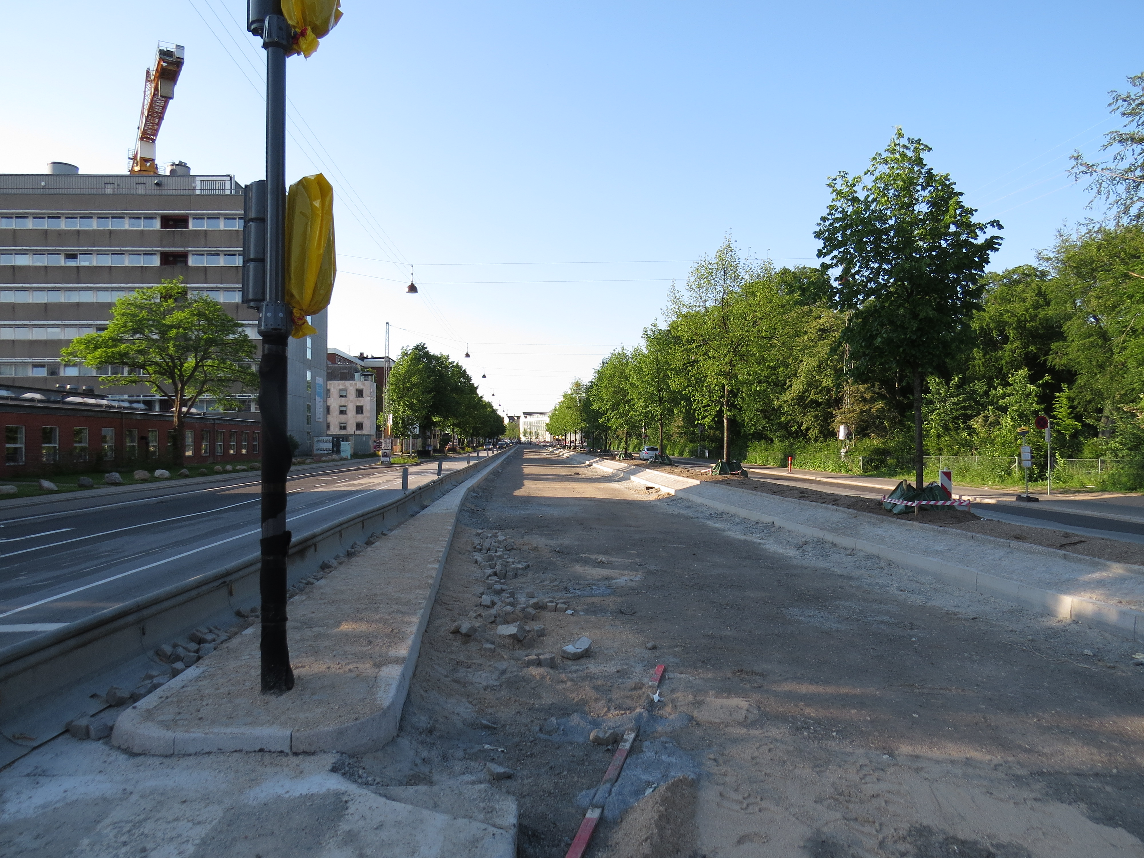 Vejarbejde for busbane – midt på vejen – isoleret fra den øvrige trafik, Nørre Allé, København